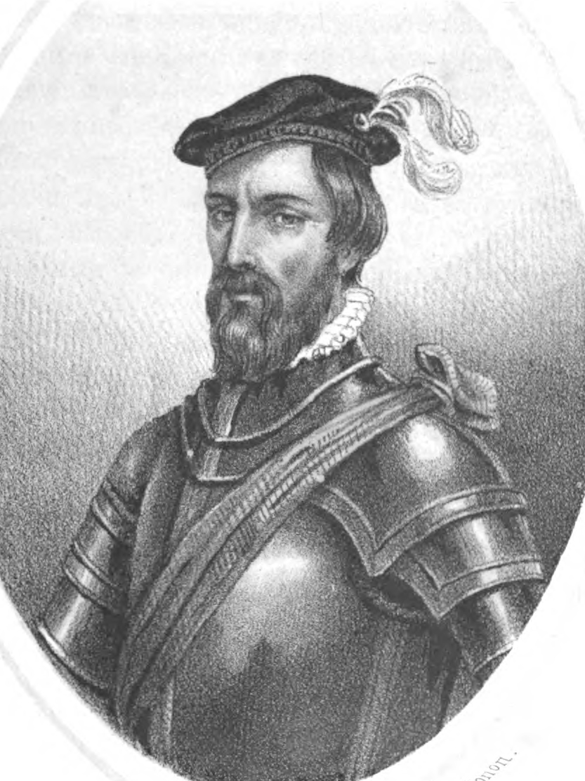 Francisco Maldonado.